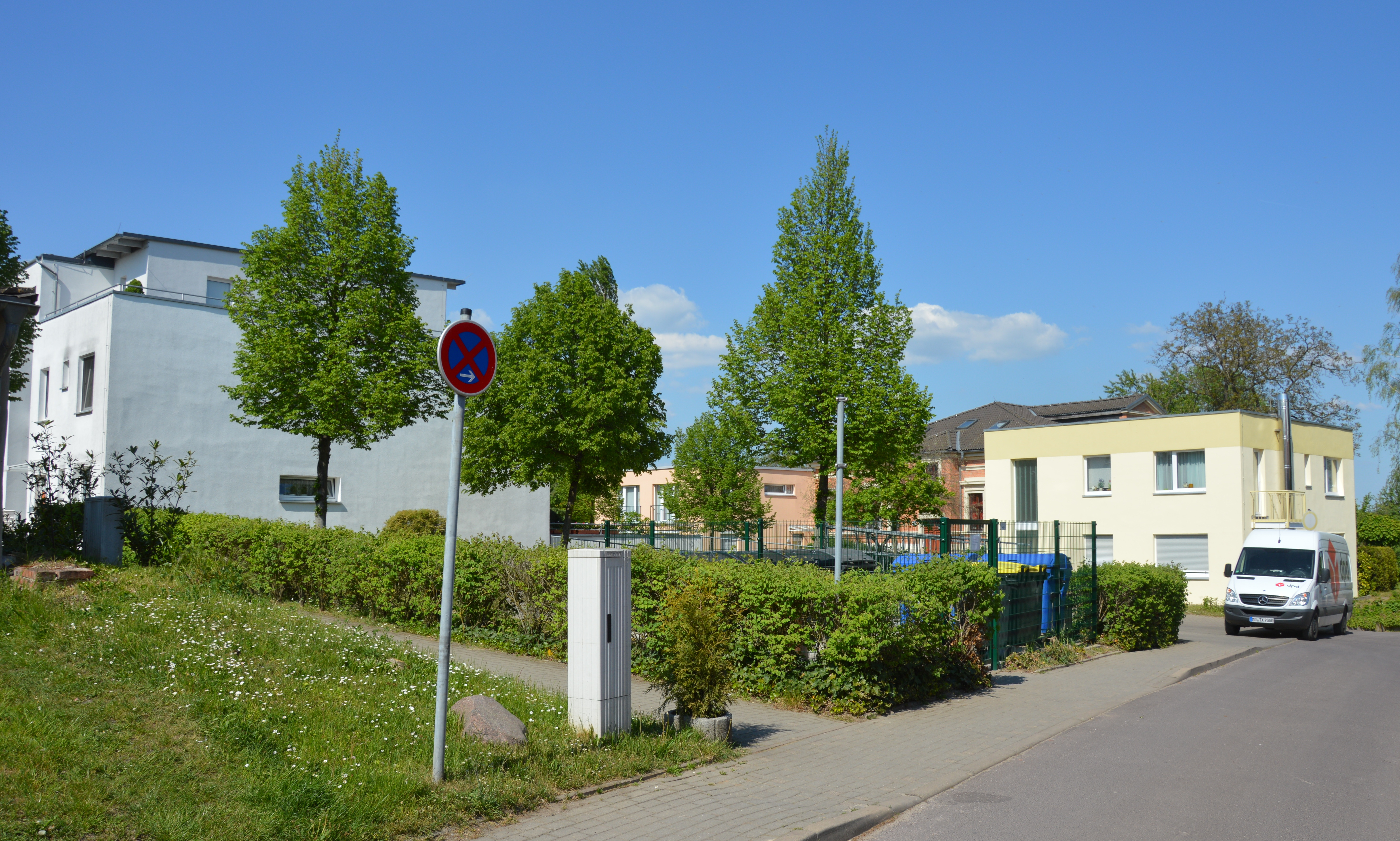 Bebauung Kieler Straße 4 in Magdeburg